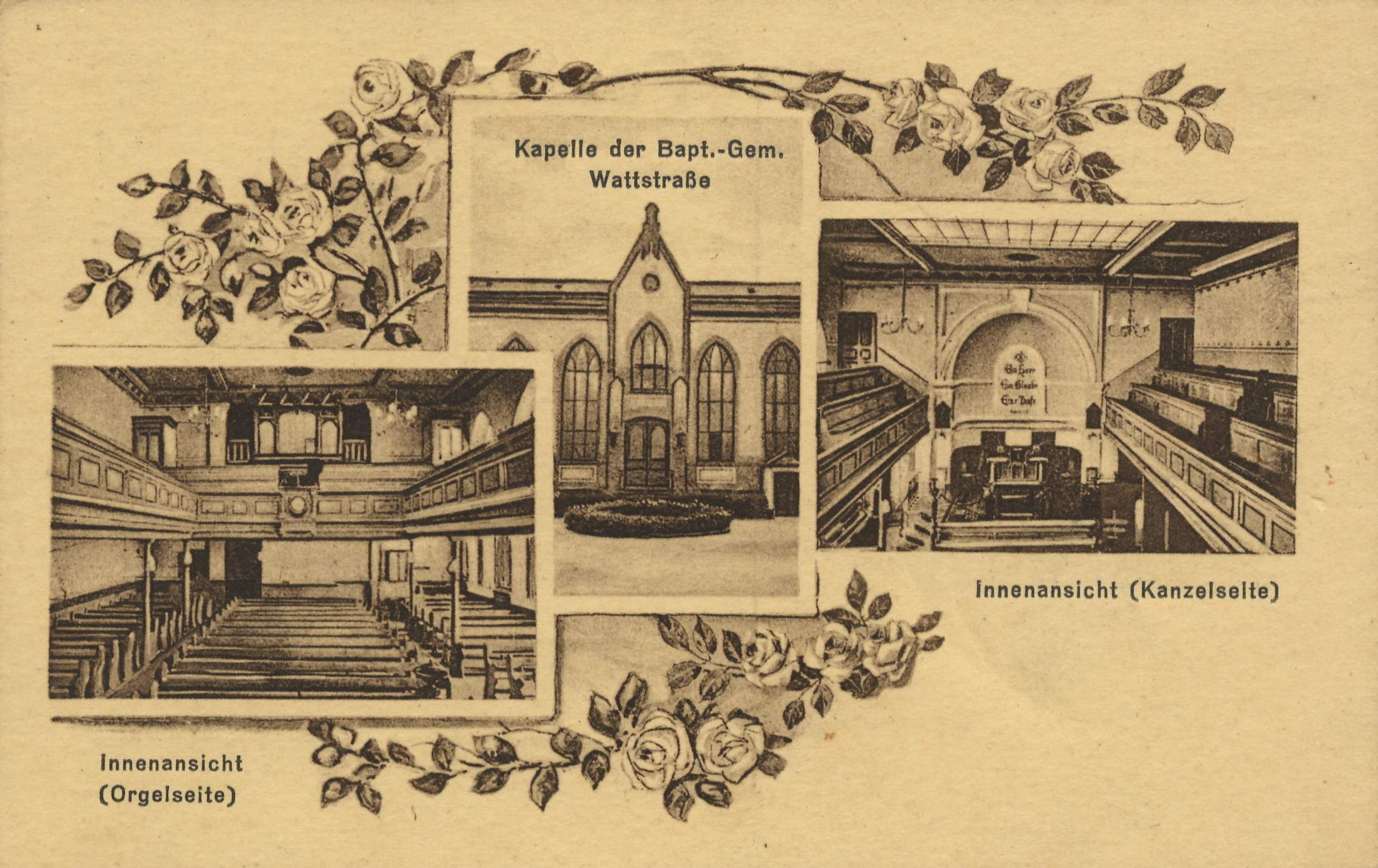 Kapelle der Baptistengemeinde in der Wattstraße, Berlin-Gesundbrunnen; die Gemeinde nennt sich heute Baptistenkirche Wedding bzw. Evangelisch-Freikirchliche Gemeinde und befindet sich nunmehr in der Müllerstraße